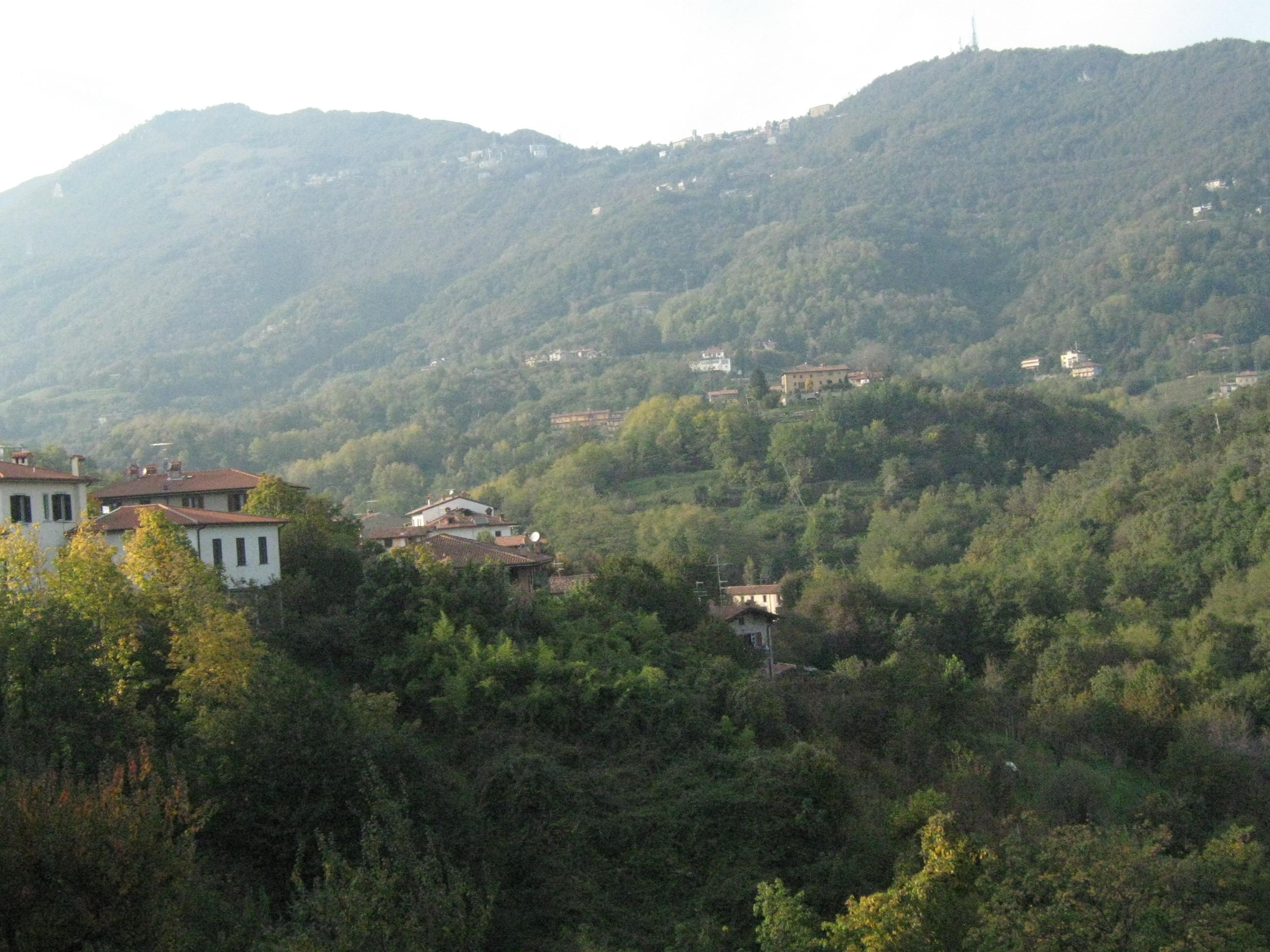 Veduta della Roncola dal centro abitato di Almenno San Bartolomeo.